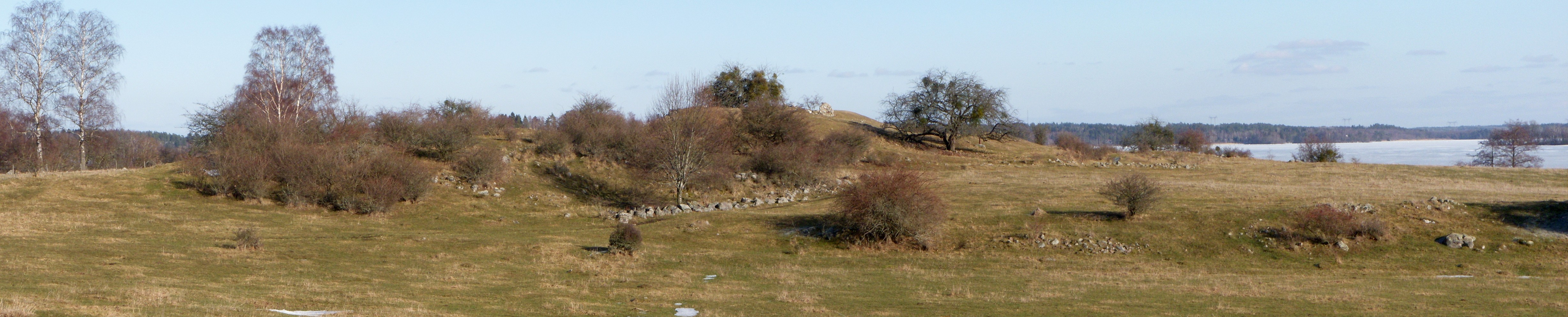 Vy över Hovgården och Alsnöhus på Adelsön